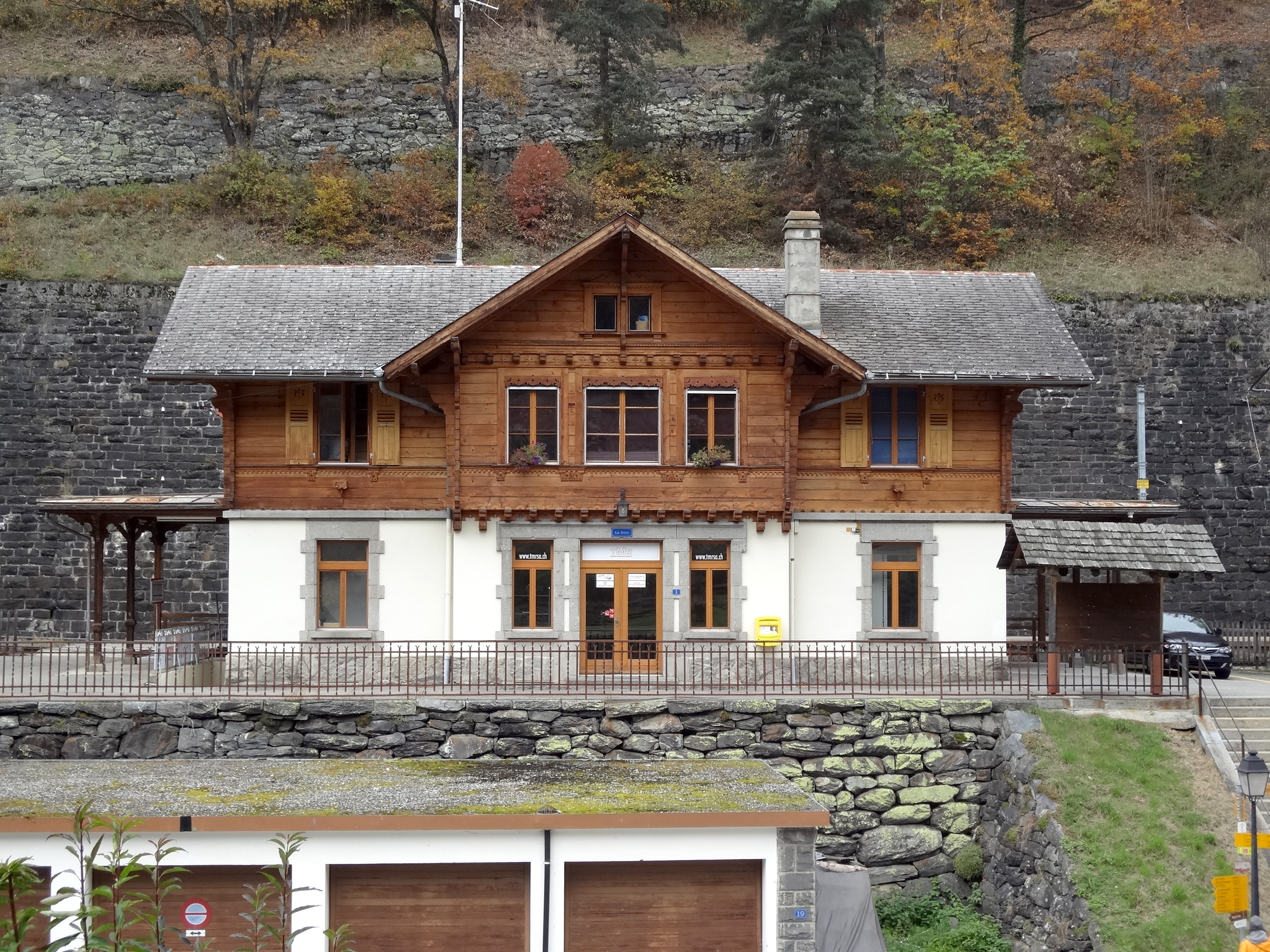 Gare de Salvan.